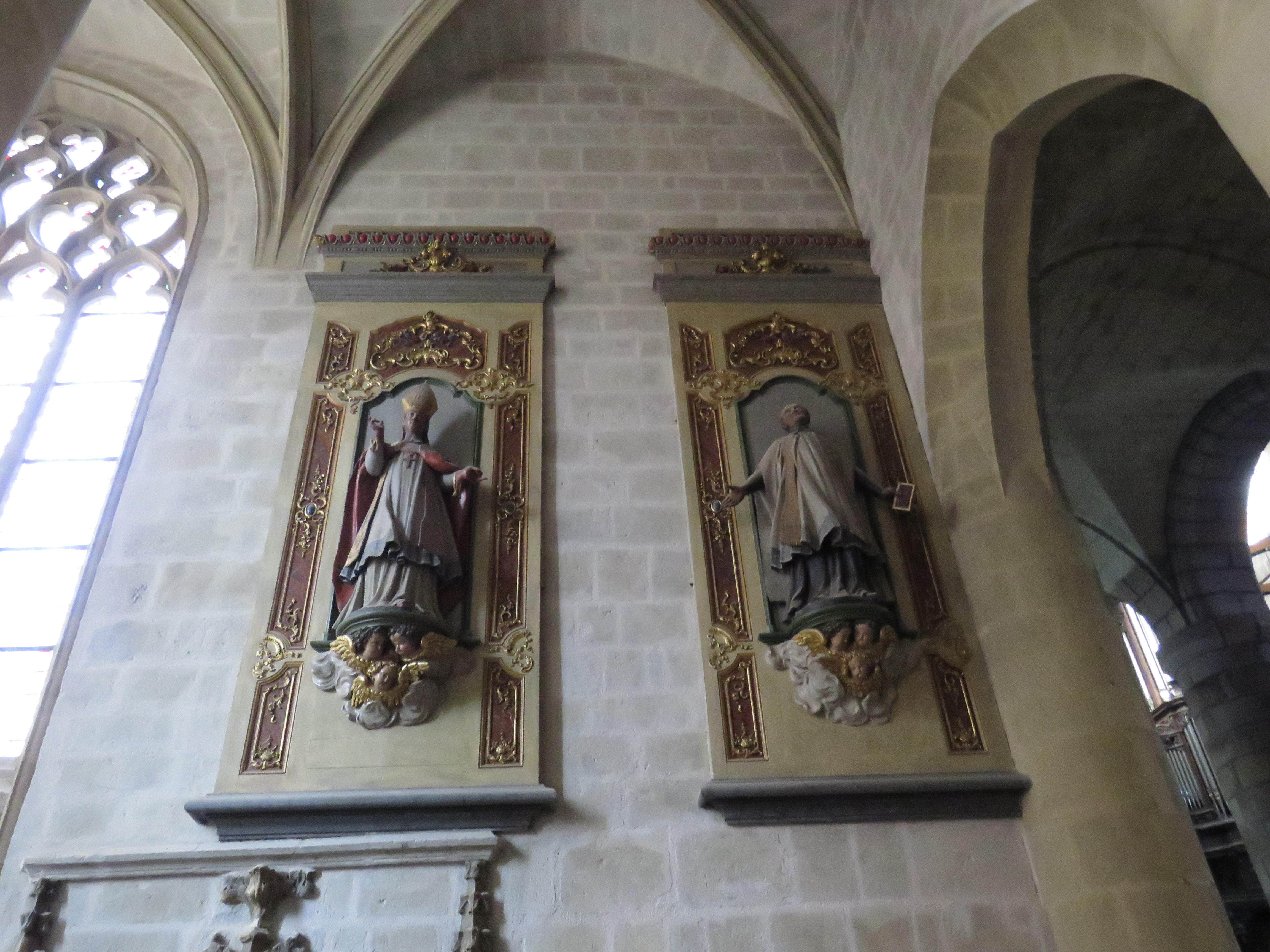 Statues en face de l'autel du Saint Sacrement.